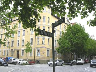 An der Valleystraße in Sendling, im Rücken das ehemals berüchtigte "Valley"-Freizeitheim